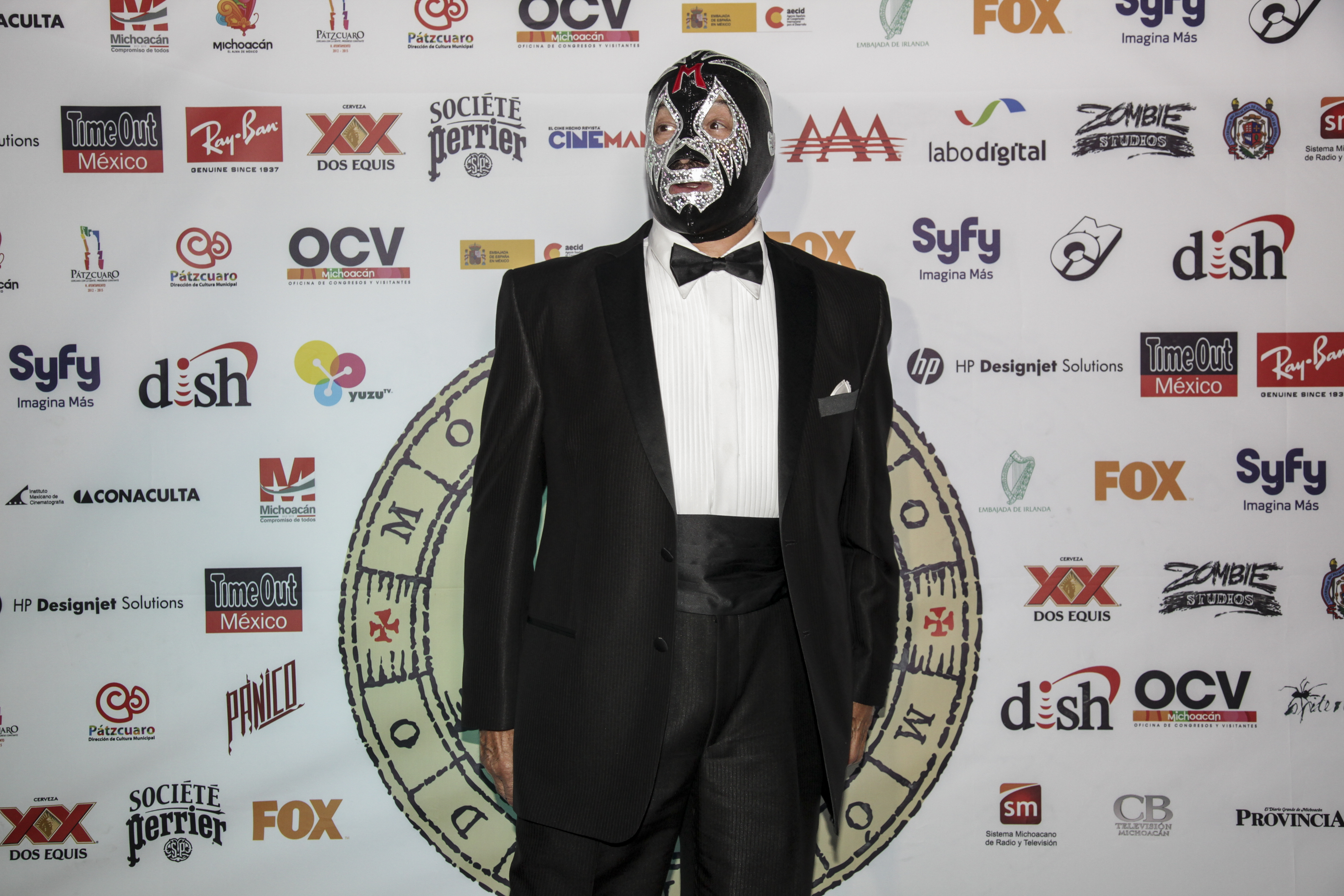 Mil Mascaras "Mr.Personalidad" en el red carpet de la inauguracion de Morbido 2012